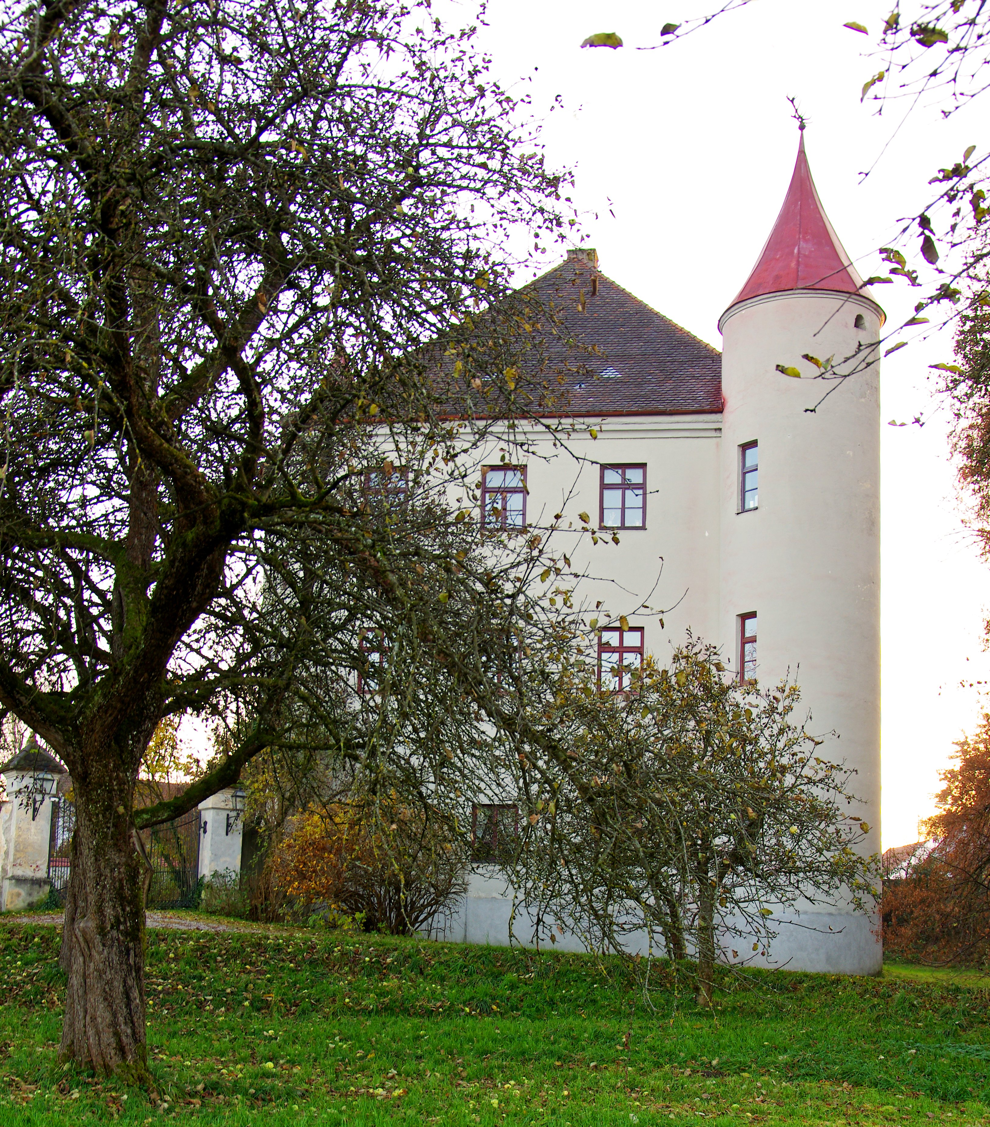 Ehemaliges Schloss, später Fürstlich Fuggersche Oberförsterei.